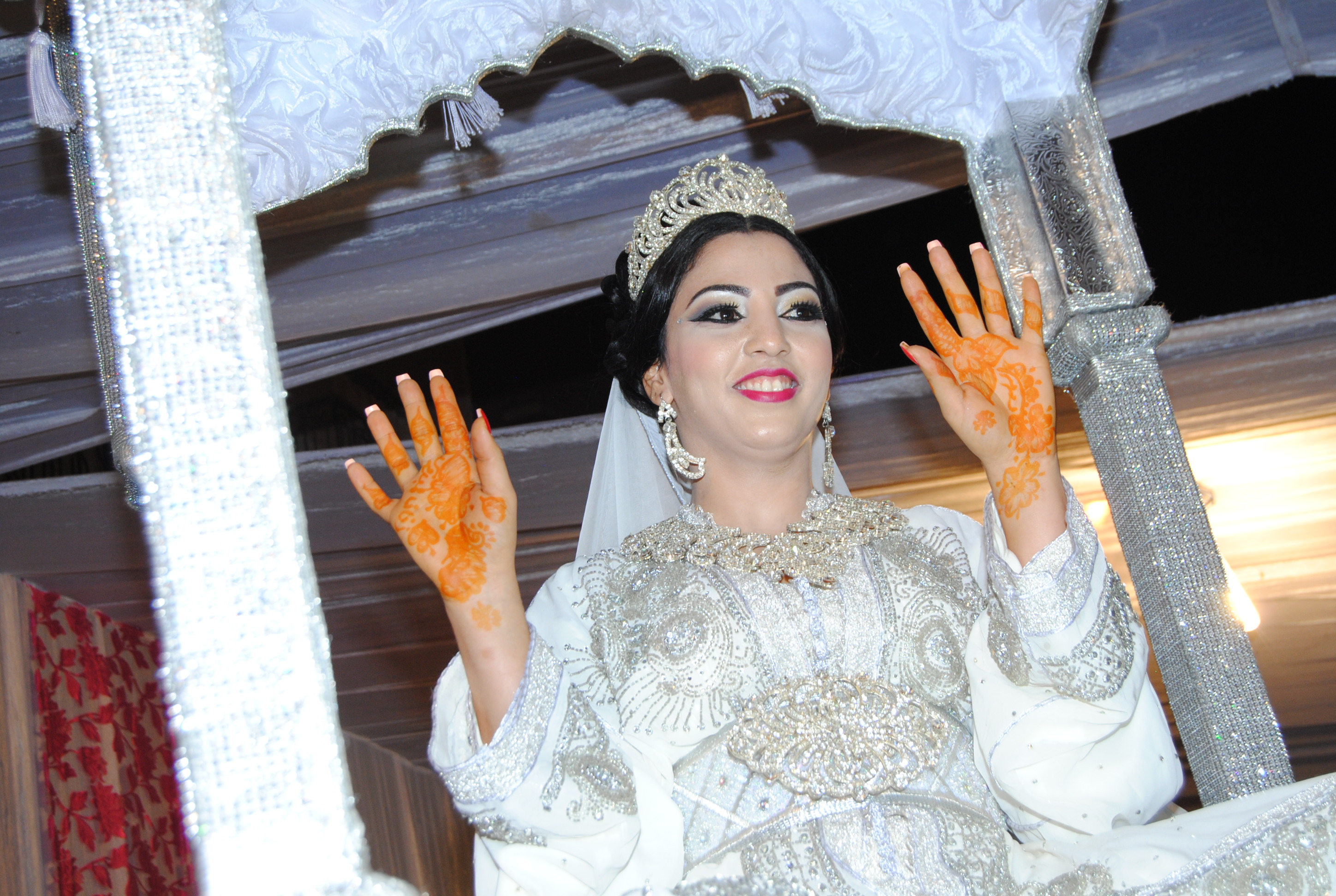 Les vêtements traditionnels pour le mariage au Maroc, qui est un caftans traditionnels et modernes, exprime la diversité culturelle arabo-africaine This is an image from Morocco